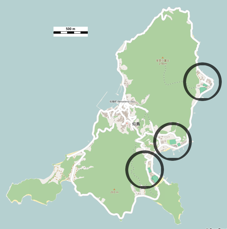 似島検疫所を示した地図。上から第一、第二、馬匹検疫所。 This map may be incomplete, and may contain errors. Don't rely solely on it for navigation.